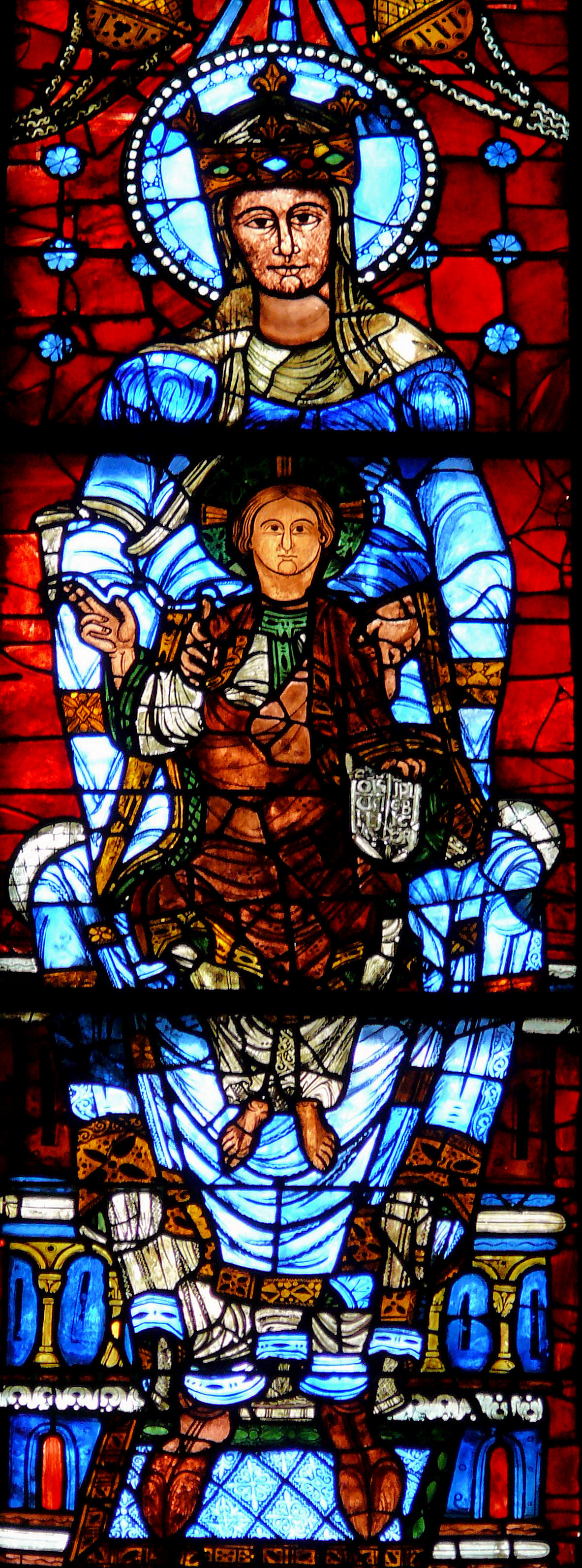 Cathédrale de Chartres - Notre-Dame-de-la-Belle-Verrière